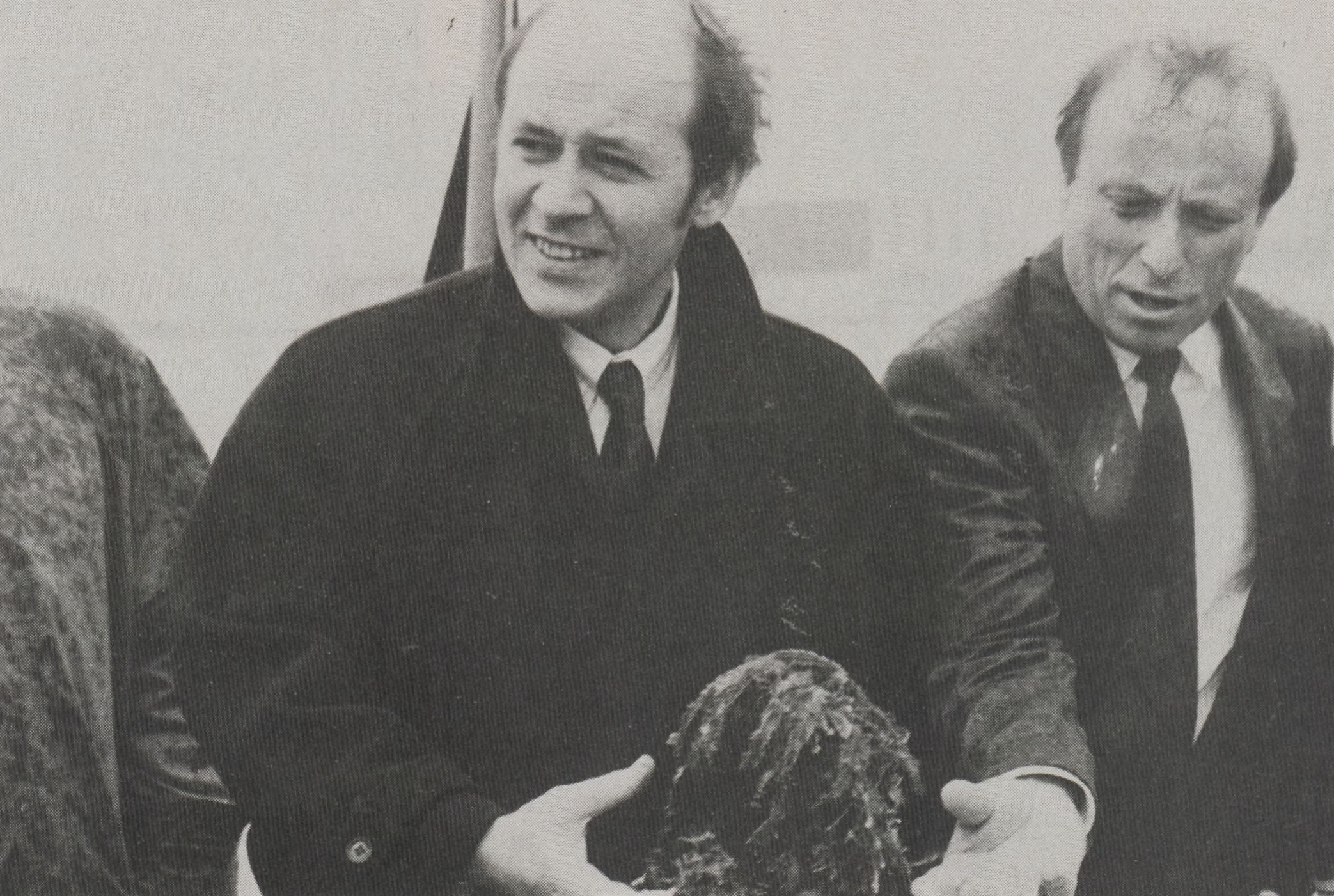 Jean-Yves Le Drian, alors secrétaire d'Etat à la Mer, à Ifremer Toulon. Il porte dans les mains un échantillon d'algue Caulerpa Tauxifolia